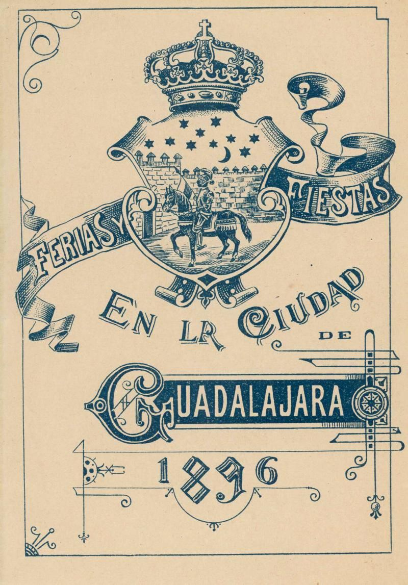 Cartel de Ferias de Guadalajara de 1896